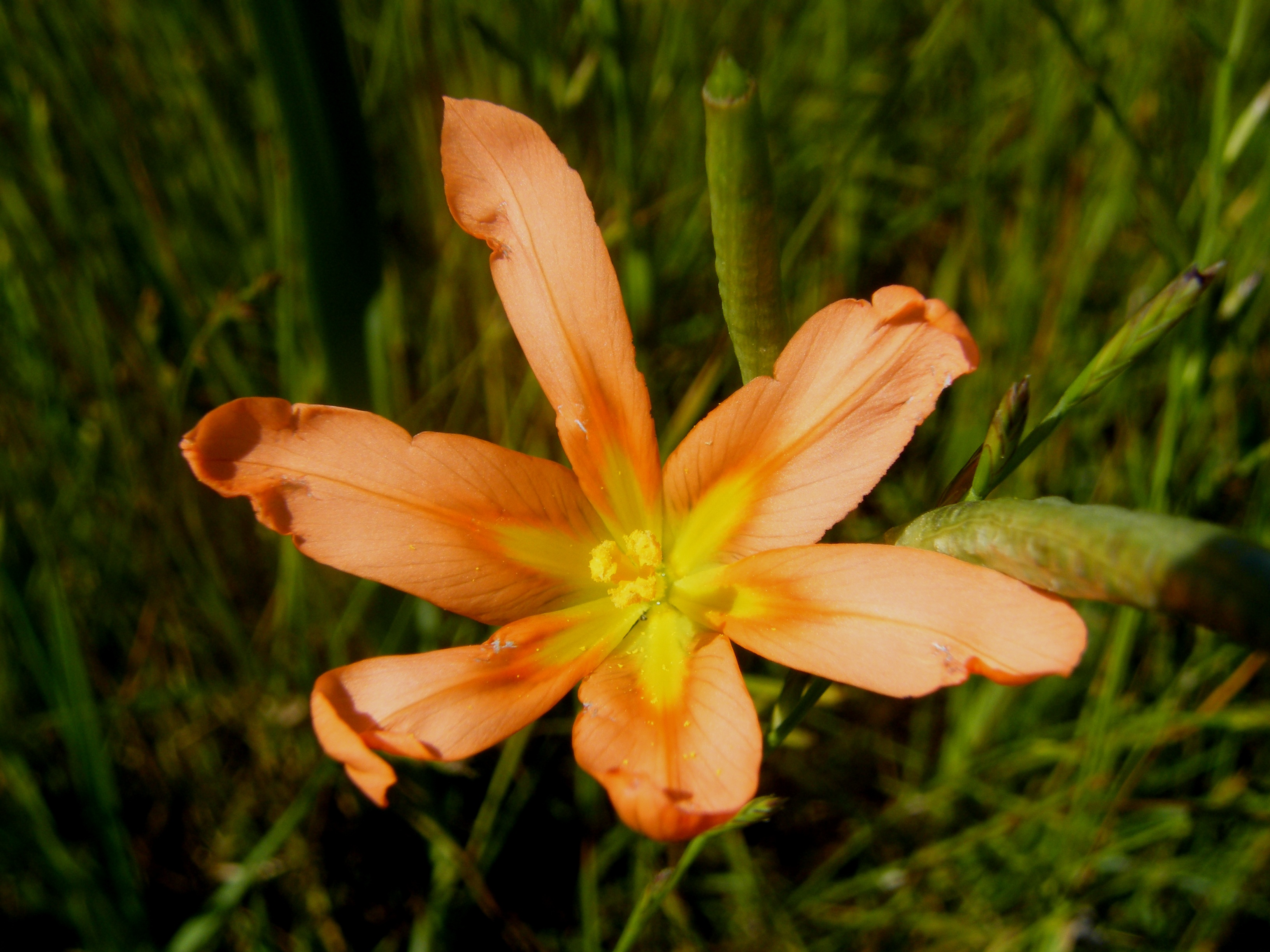 Groottulp